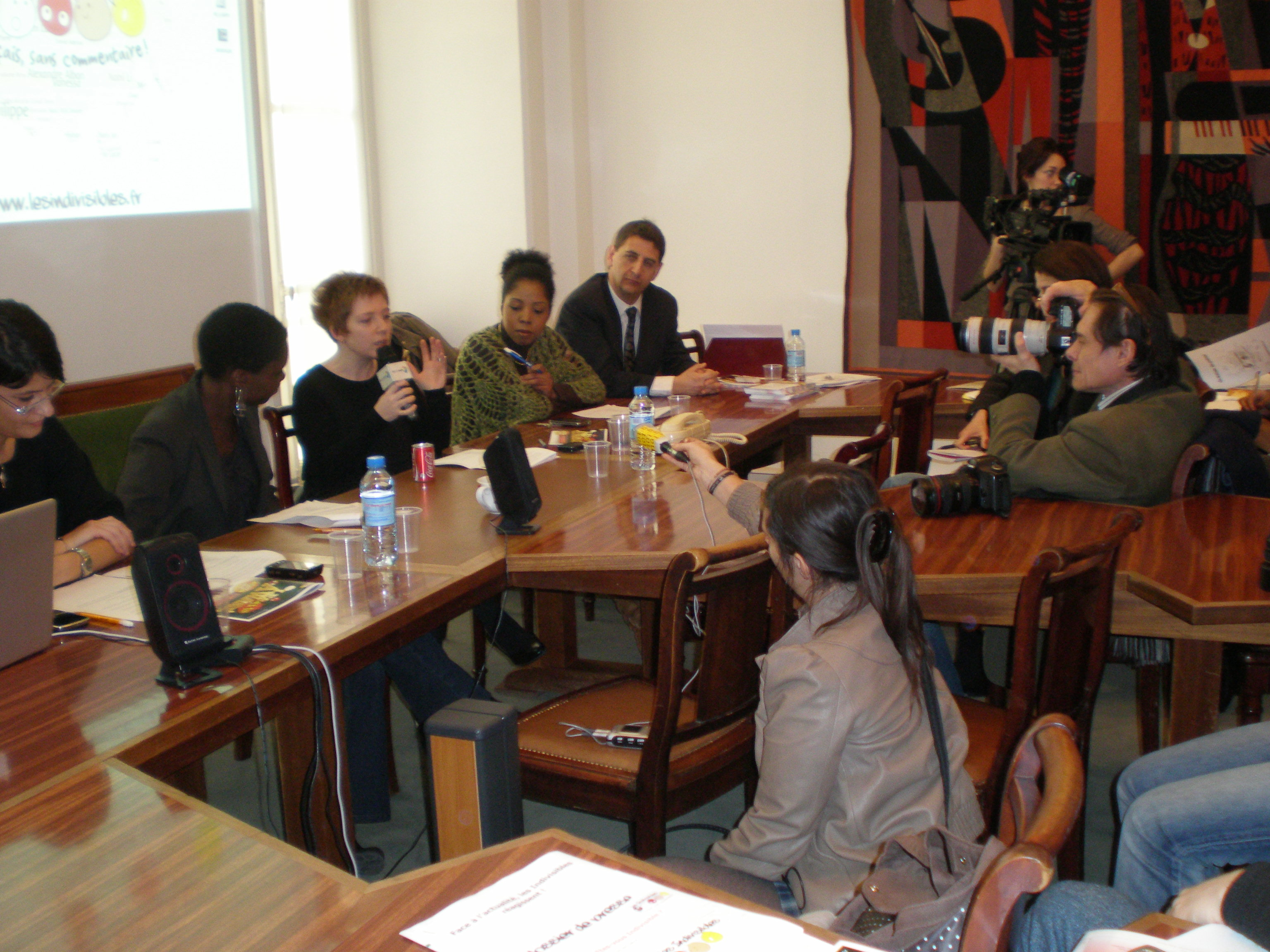 Le député Daniel Goldberg (à droite de l'image) lors de la conférence de presse des Indivisibles pour les premiers Y'a Bon Awards à l'Assemblée Nationale. De gauche à droite Linda Baha, Rokhaya Diallo, Anne Littardi (au micro), Laurence Lascary.